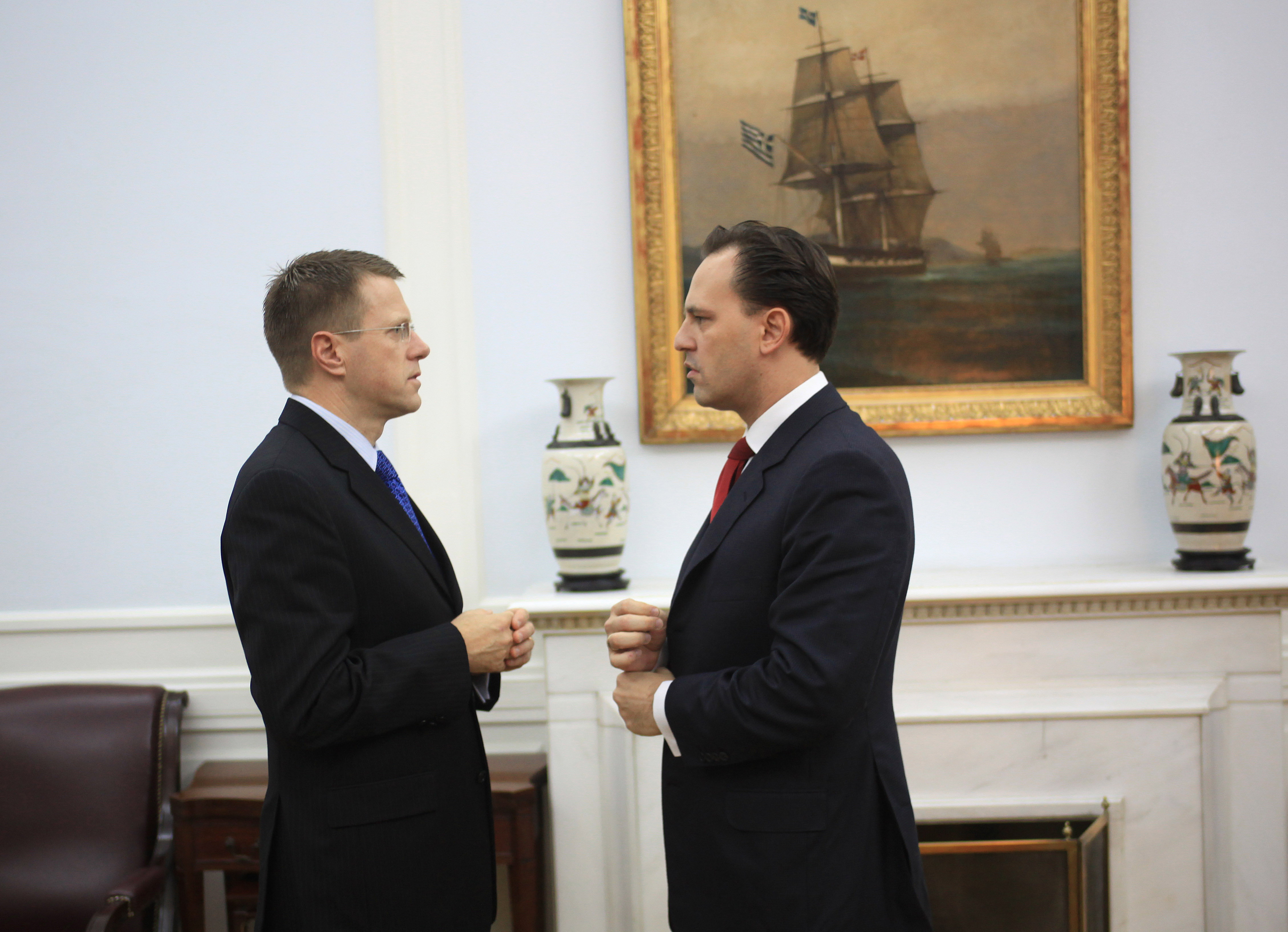 Ο Υπουργός Εξωτερικών, κ. Δημήτρης Δρούτσας συναντήθηκε με τον Υπουργό Εξωτερικών της Σλοβενίας κ. Samuel Zbogar, ο οποίος πραγματοποιεί επίσκεψη στη χώρα μας.(ΥΠΕΞ 30-10-2010)